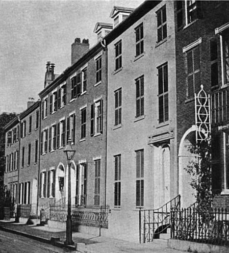 Boston, Massachusetts